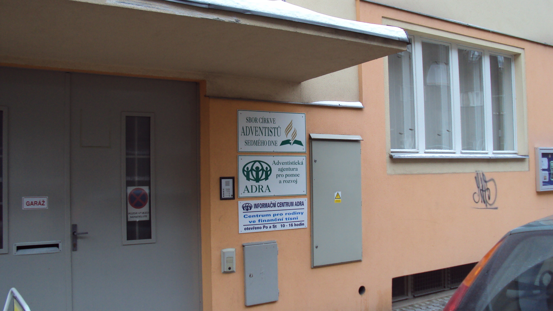 Dům v České Lípě, kde sídlí pobočka ADRY a Církve adventistů